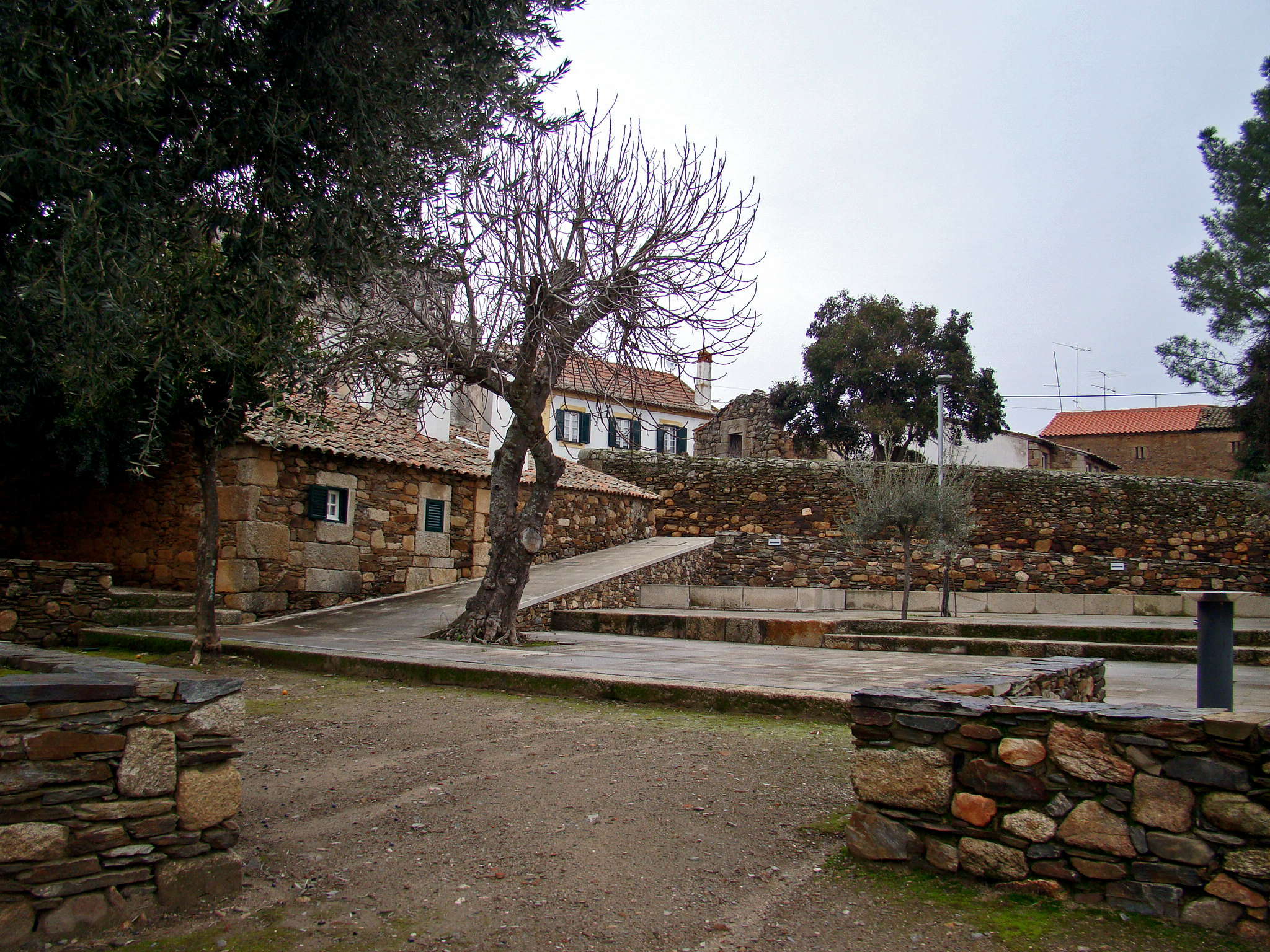 Catedral de Idanha-a-Velha This monument is classified as Monumento Nacional. This file was uploaded for Wiki Loves Monuments in Portugal with the unique identifier 70554.